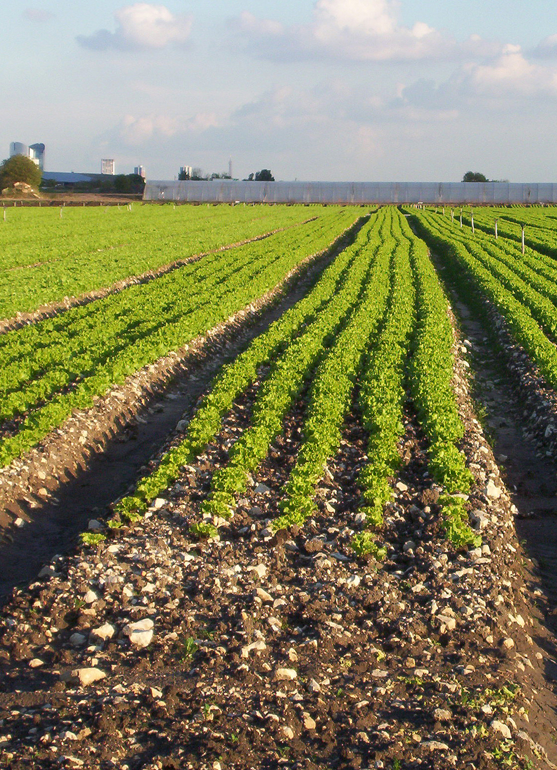 Maraichers de Montesson, Yvelines (78) France